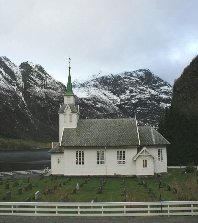 Bjørke kyrkje, Volda, Norway